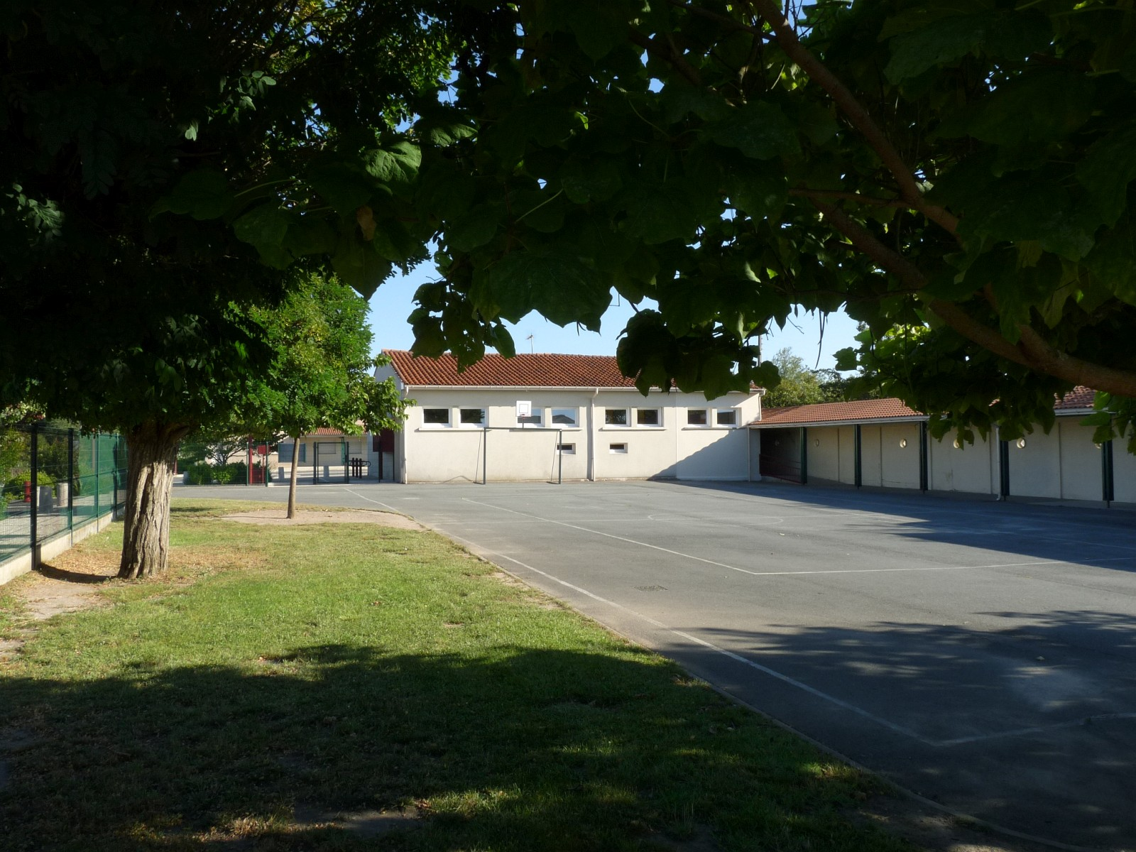 Ecole, St-Caprais-de-Blaye, Gironde, France